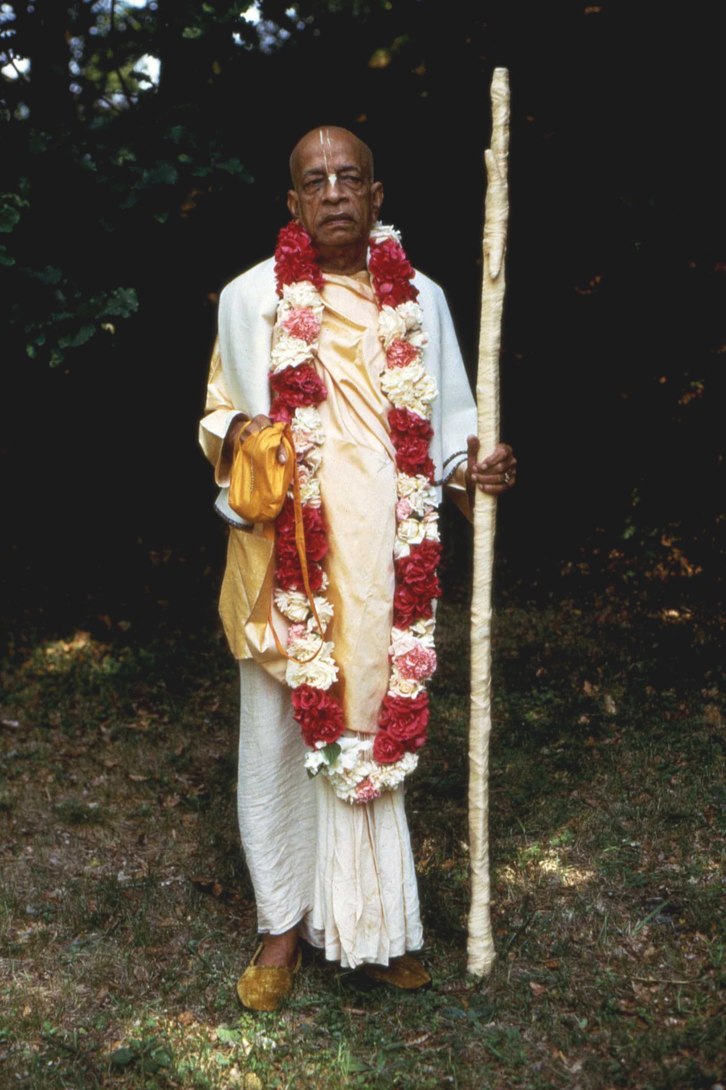 Zakladatel hnutí Háre Krišna kdesi v německém lese